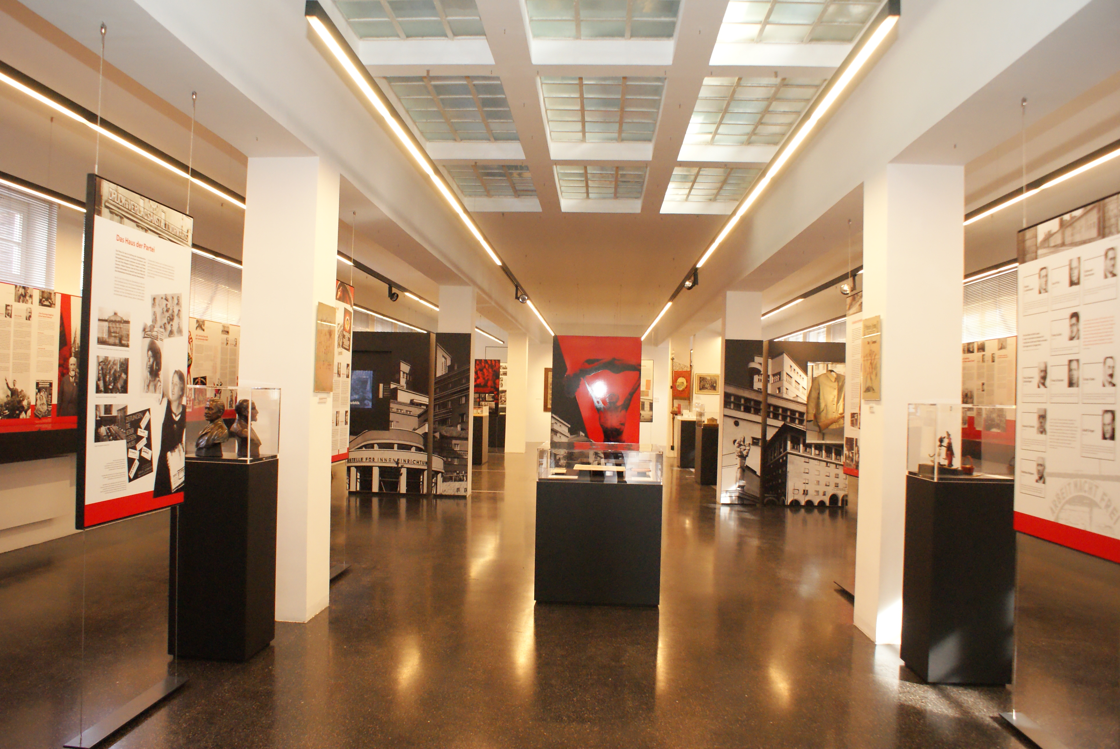 Karl-Marx-Hof - Waschsalon Dieses Bild wurde anlässlich des österreichischen Tags des Denkmals 2012 in Wien eingereicht.